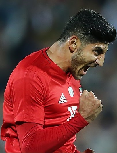 مهدی ترابی در دیدار تیم‌های فوتبال ایران و بولیوی